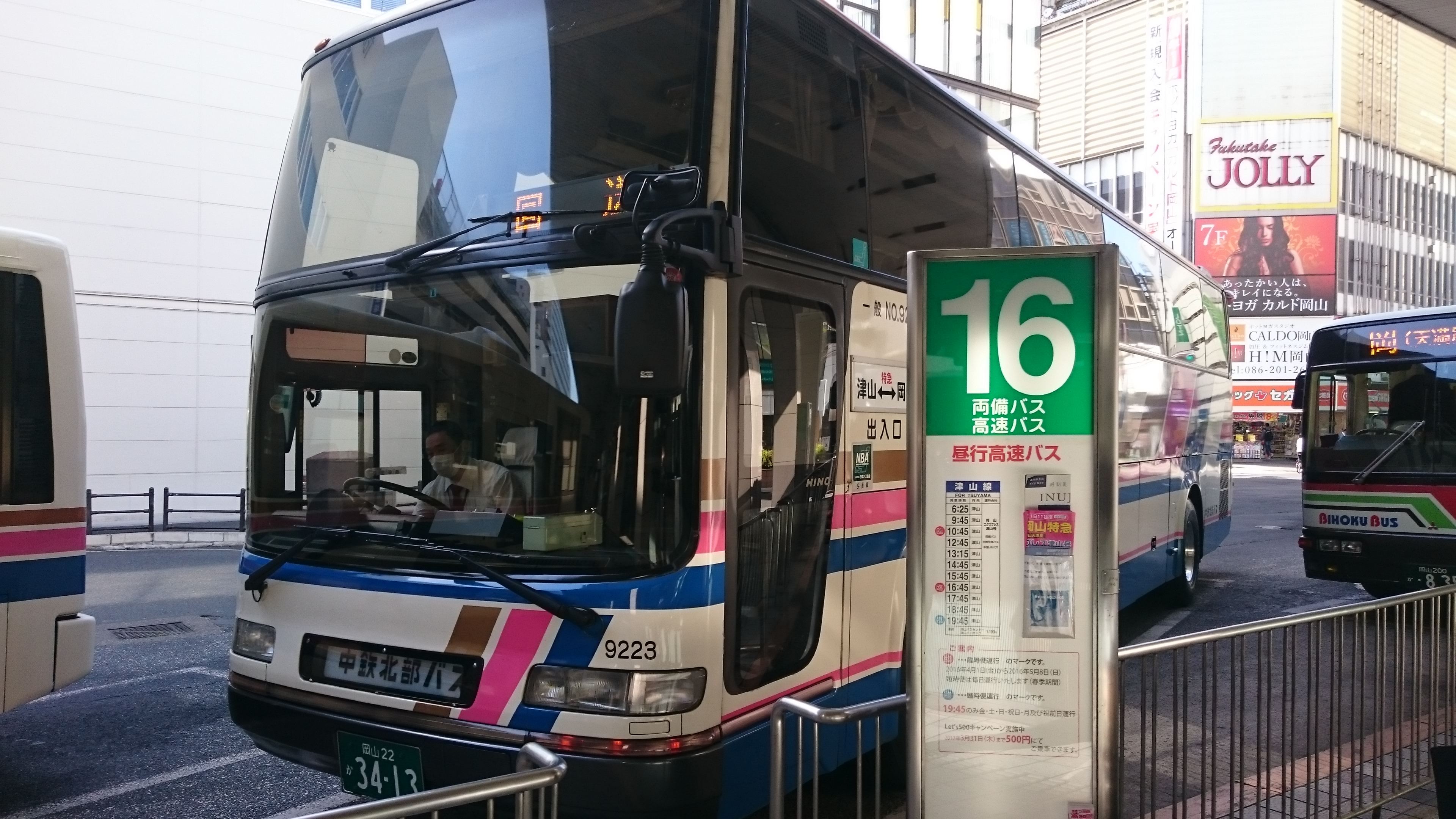 中鉄北部バスの岡山エクスプレス津山号の車両です。